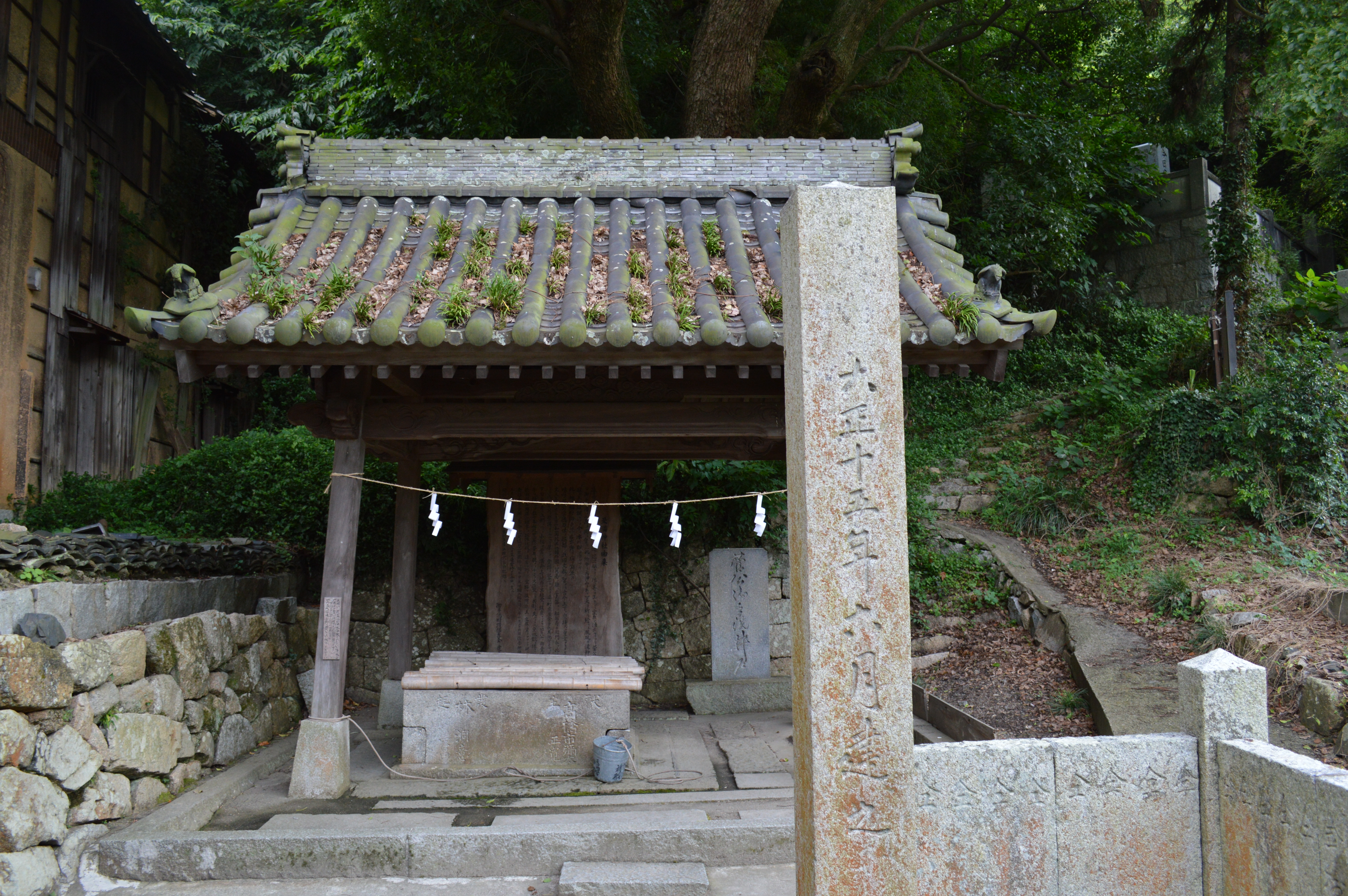 大崎下島（広島県呉市）の重要伝統的建造物群保存地区「御手洗」